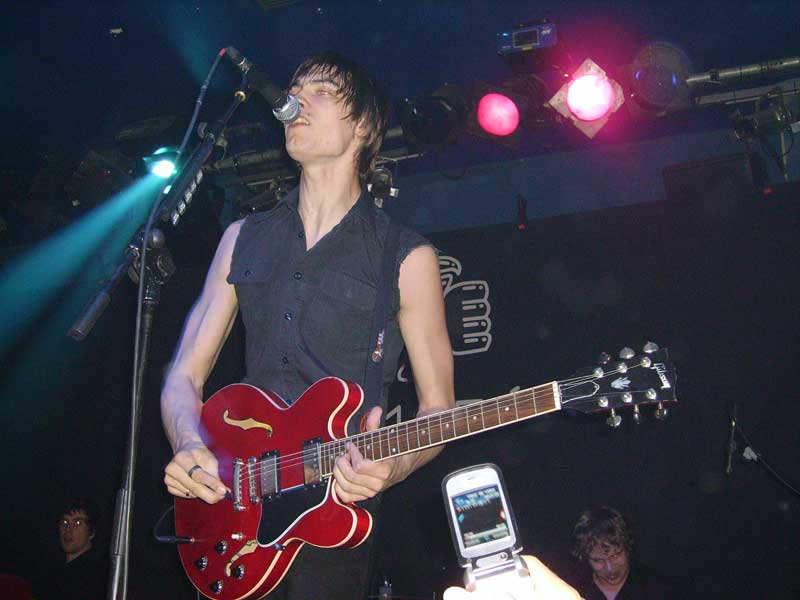 Gustaf Norén cantante del grupo mando diao. Concierto del 20 de Abril de 2006 en la antigua sala "Cormorán" de Valencia, España.